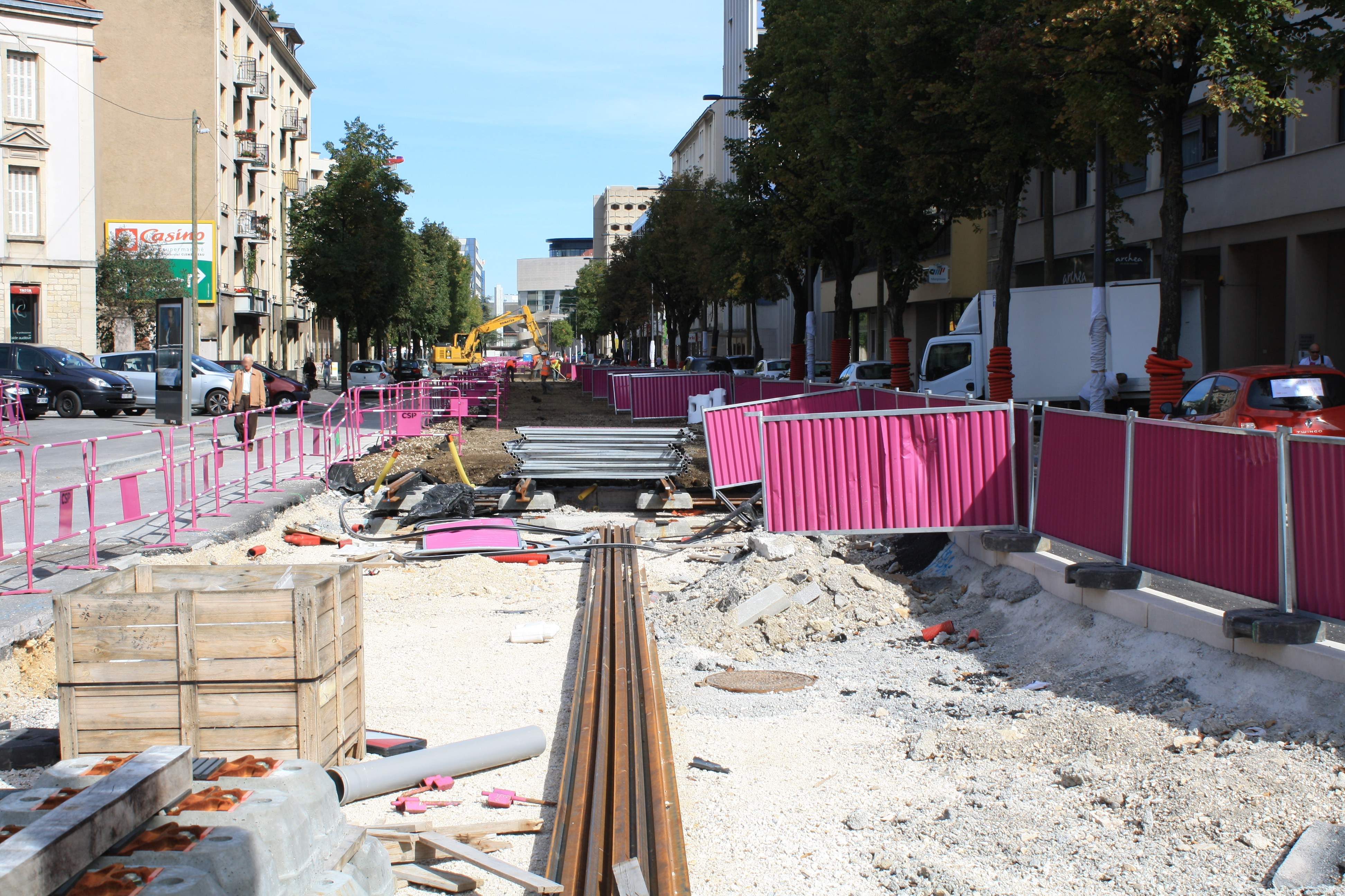 Chantier du tramway de Dijon en 2011 - Creusement Chaussée Boulevard Clémenceau.